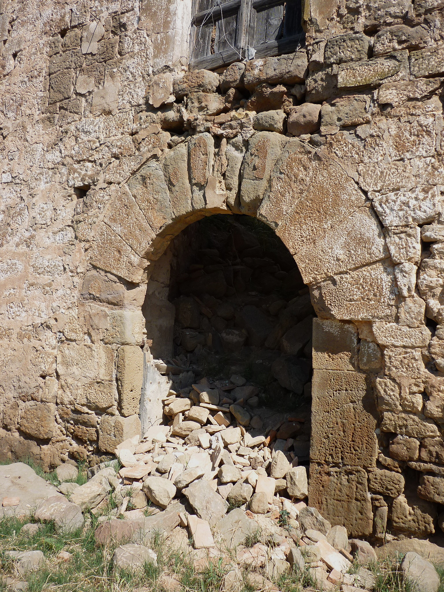 Castell de Llanera (Torà): portal d'entrada